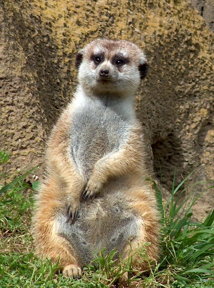 Meerkat at the San Diego Zoo in 2003.